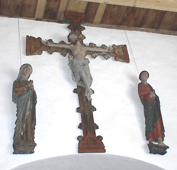 Kalvariegruppe Skoger gamle kirke.